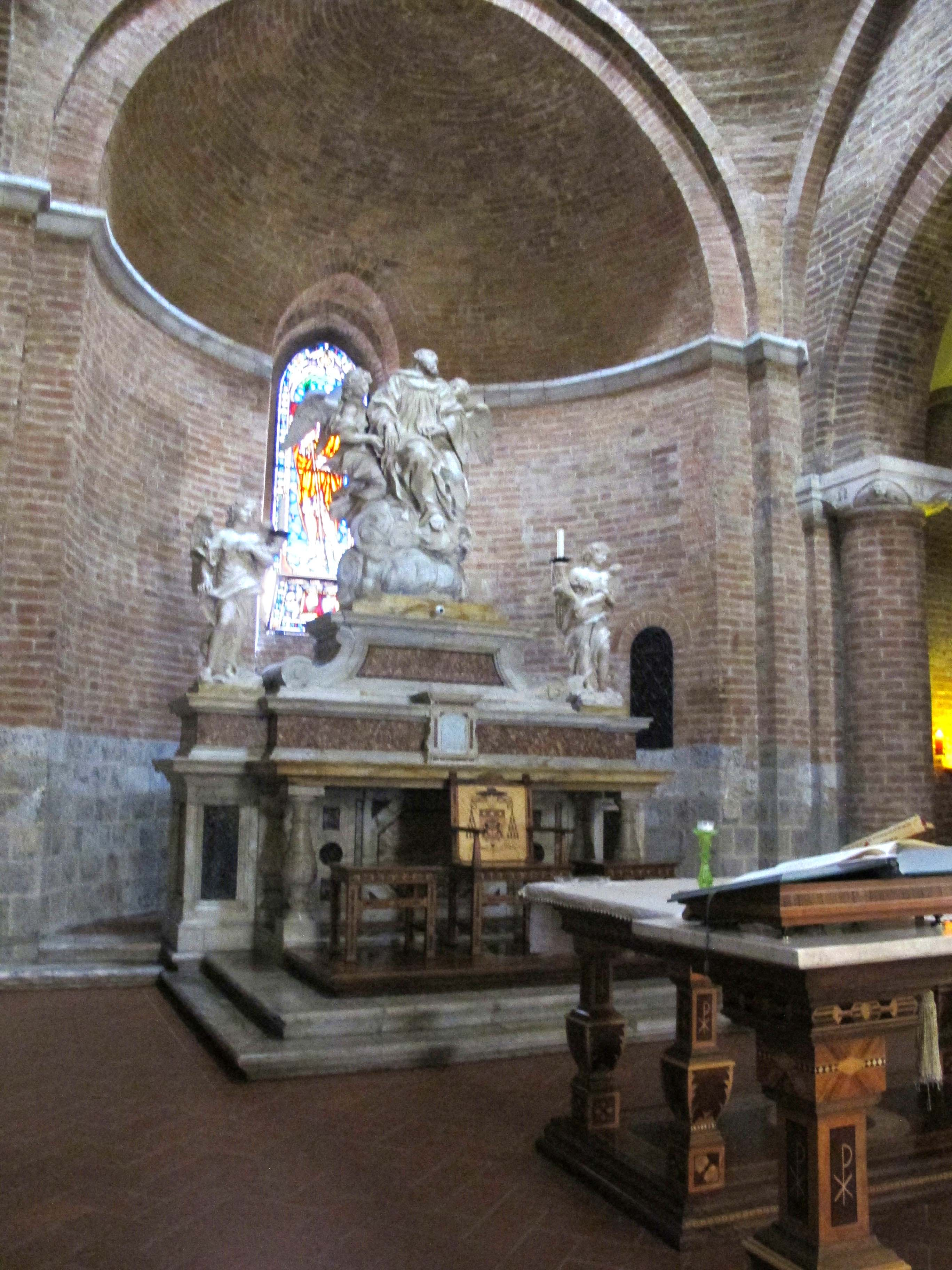 Banchi di Sotto e dintorni, Siena